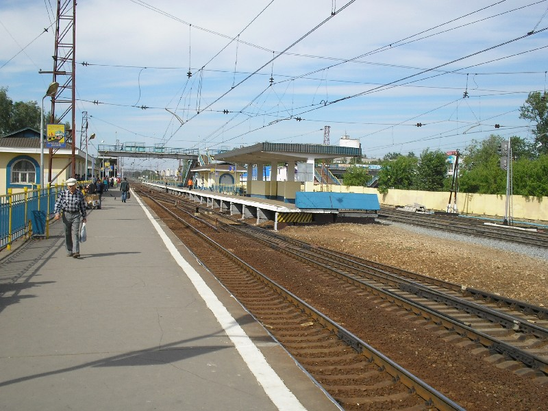 Permission